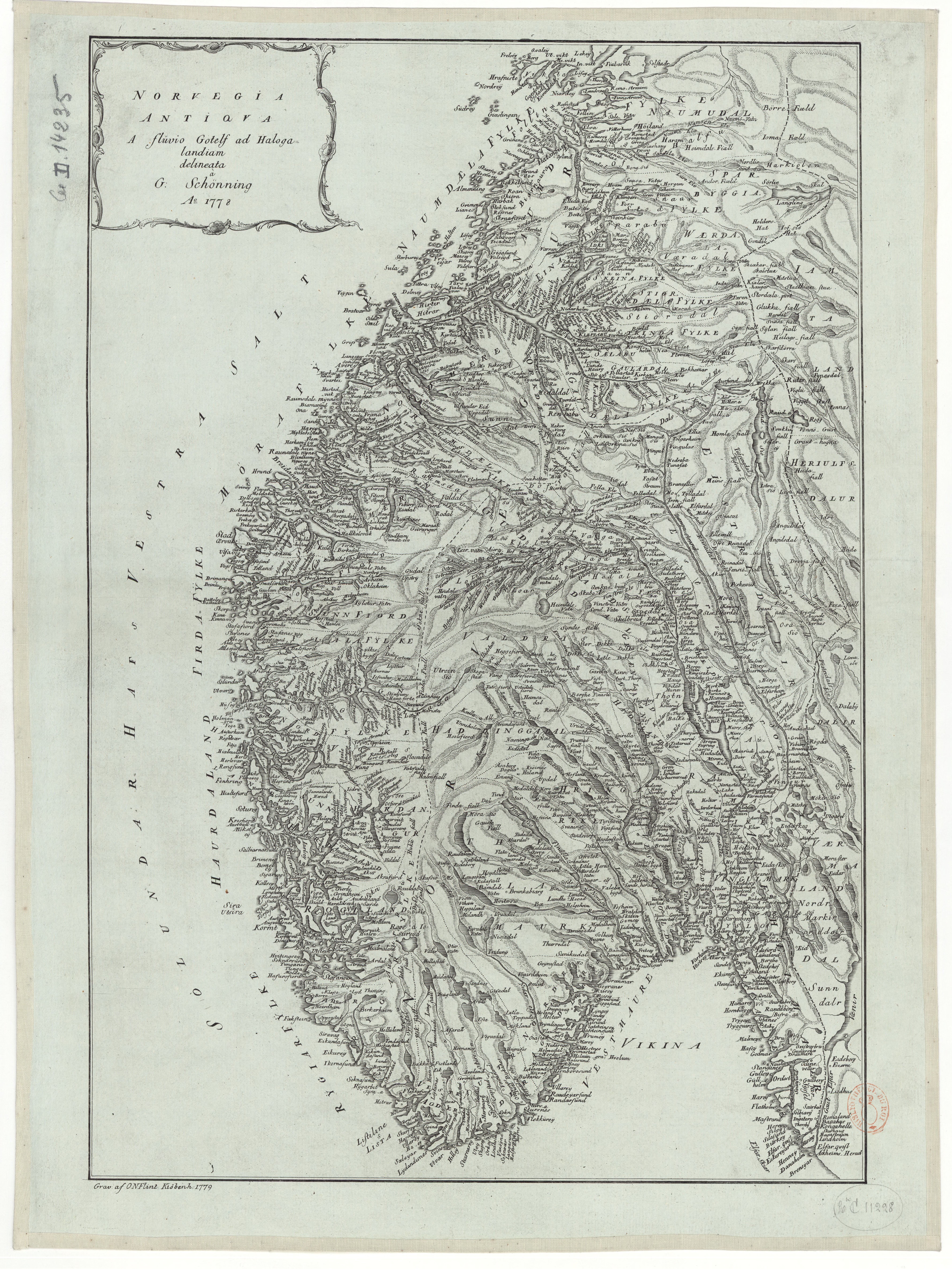 Norvegia antiqva a fluvio Gotelf ad Holagolandiam delineata a G. Schönning Ao 1778 («Det gamle Norge fra Gøta elv til Hålogaland tegnet av G. Schøning i året 1778»).